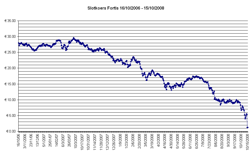 Slotkoersen Fortis afgelopen twee jaar